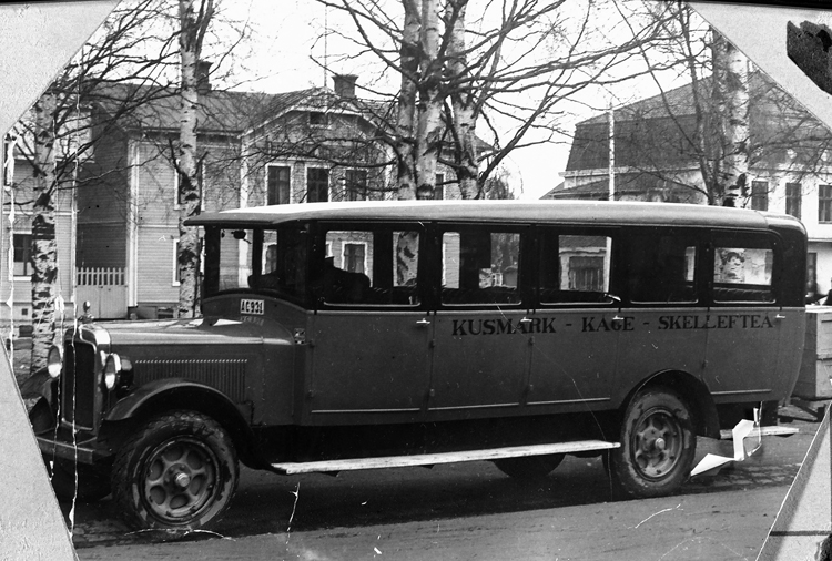 Personomnibussen AC 931, den buss som 1928 trafikerade sträckan Kusmark - Skellefteå.